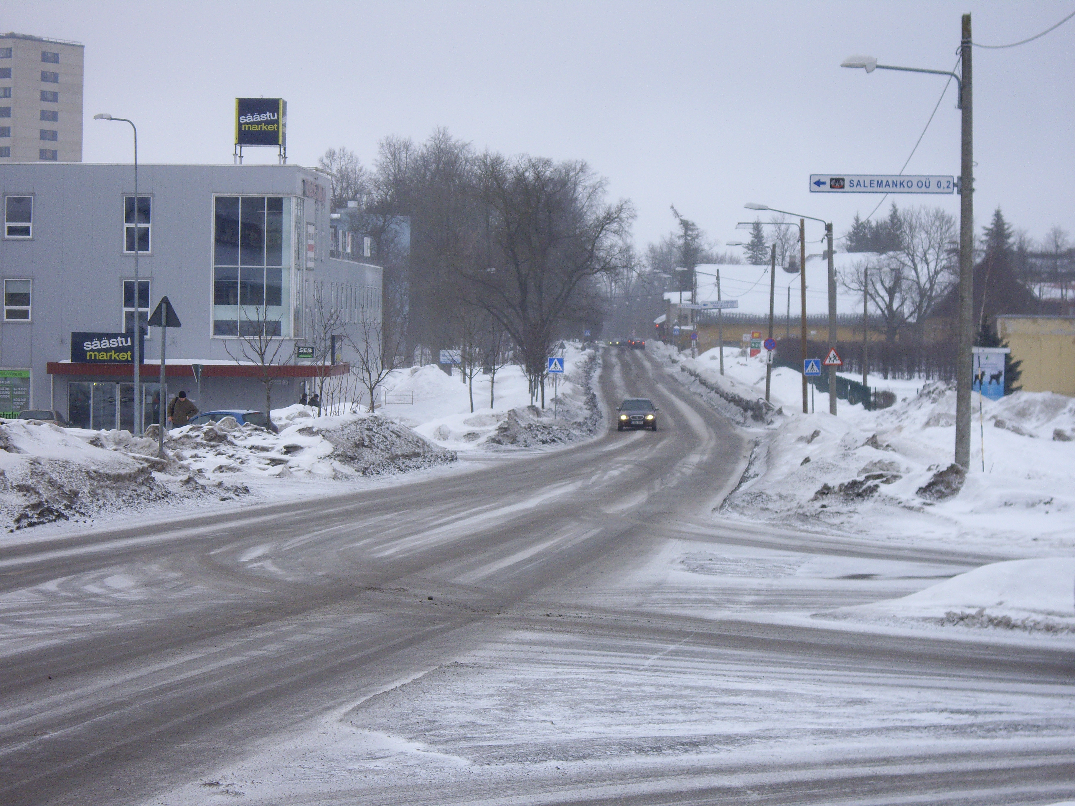 Friedebert Tuglase tänav, Tartu.